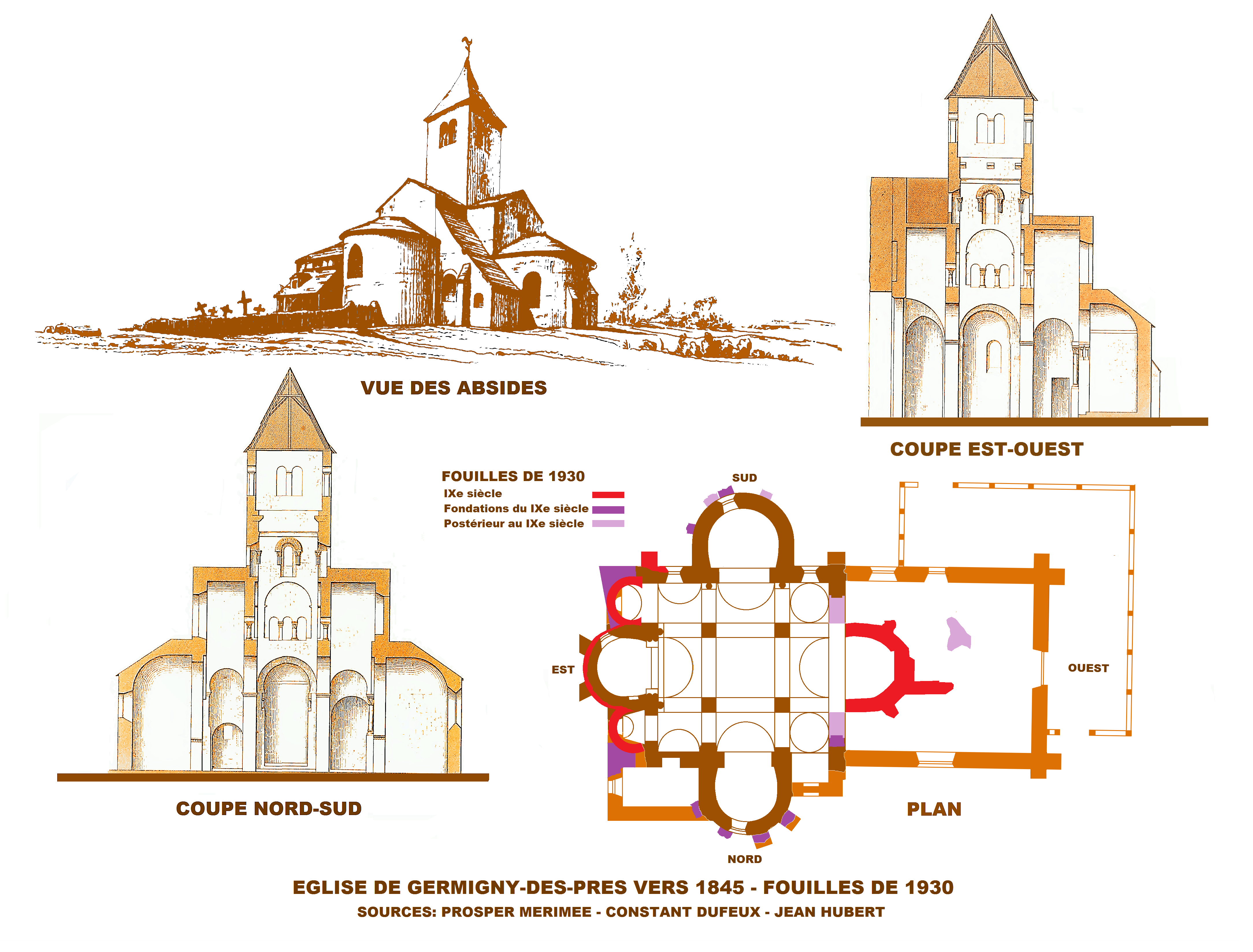 Oratoire carolingien de Germigny-des-Prés, état en 1845 avec les fouilles de 1930